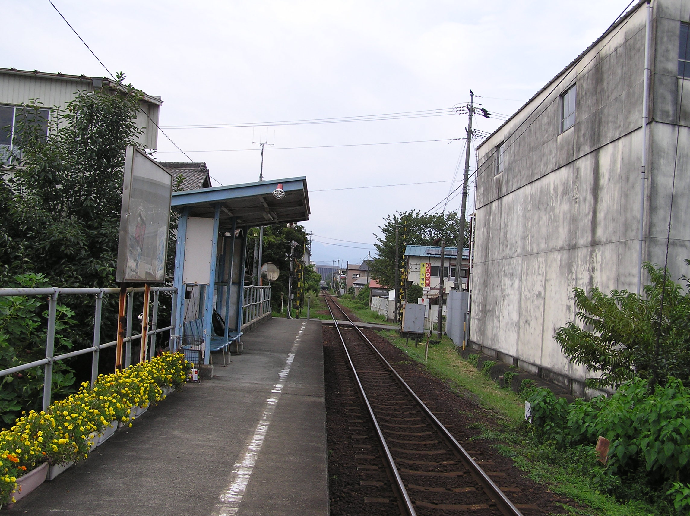 長良川鉄道越美南線、刃物会館前駅。